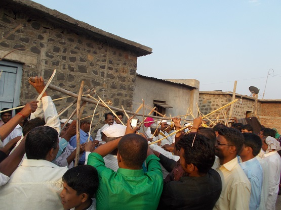 Holi festival ki rasam sarik sariya....